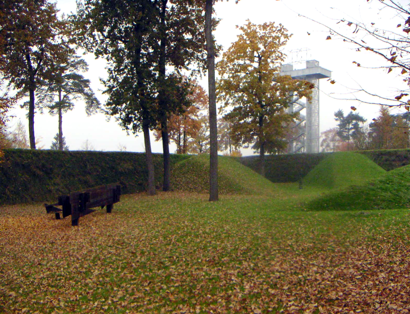 Österreichischer Skulpturenpark, Unterpremstätten bei Graz, Blick auf Aussichtsturm der IGS 2000 (Oktober 2005). Davor die Stahlskulptur Natalexos von Tony Long, 1987